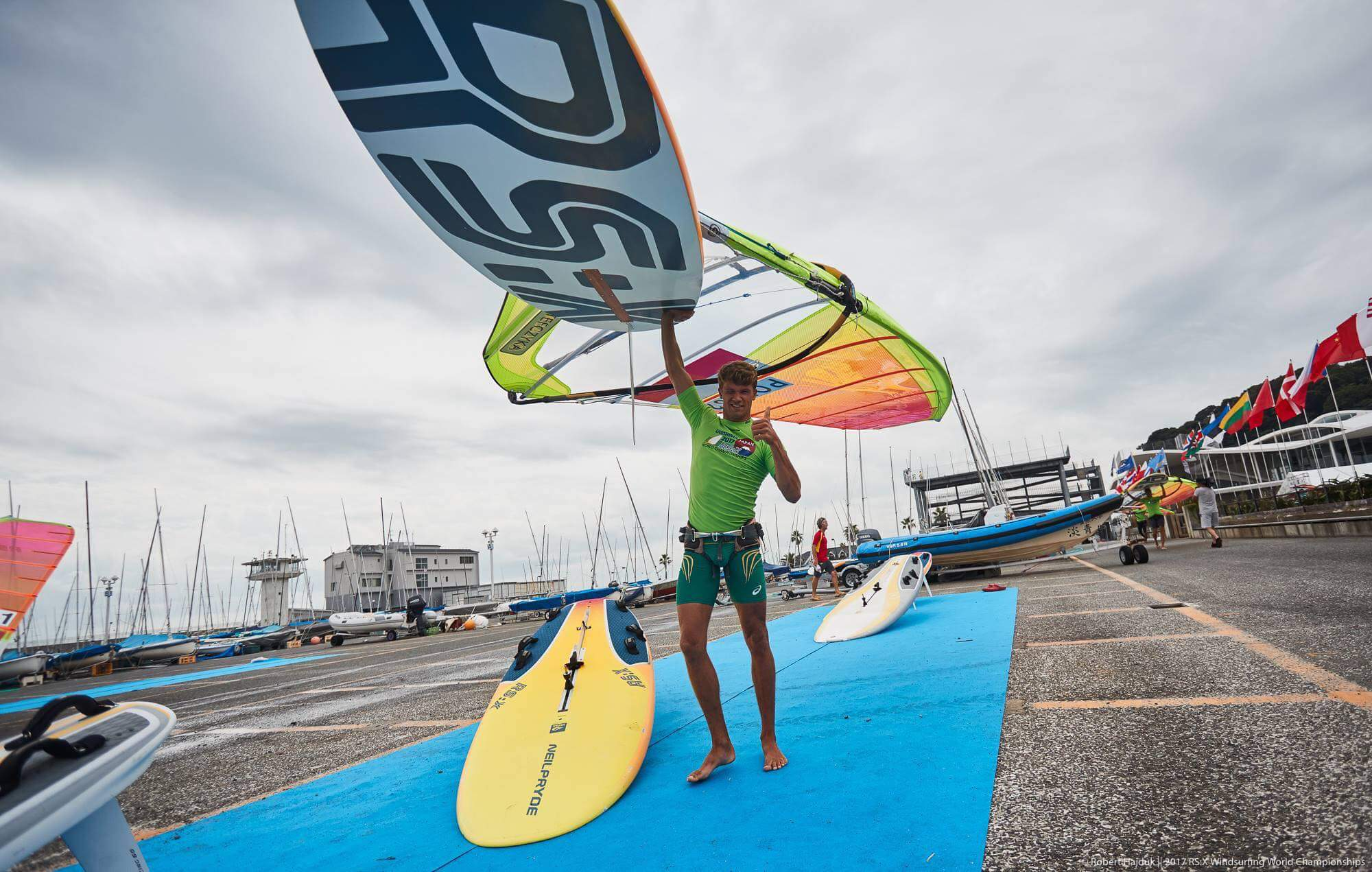 "Paweł Tarnowski w Gamagōri, IX 2017" - fotografia autorstwa Roberta Hajduka.